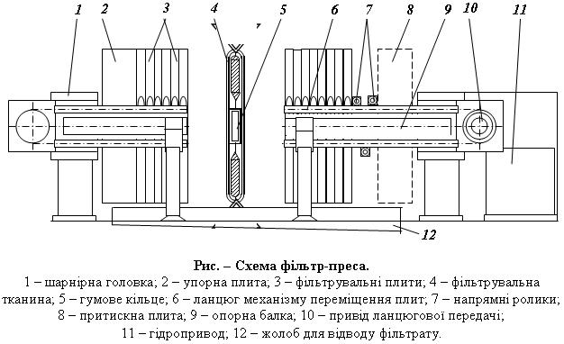 Фільтр-прес: Схема